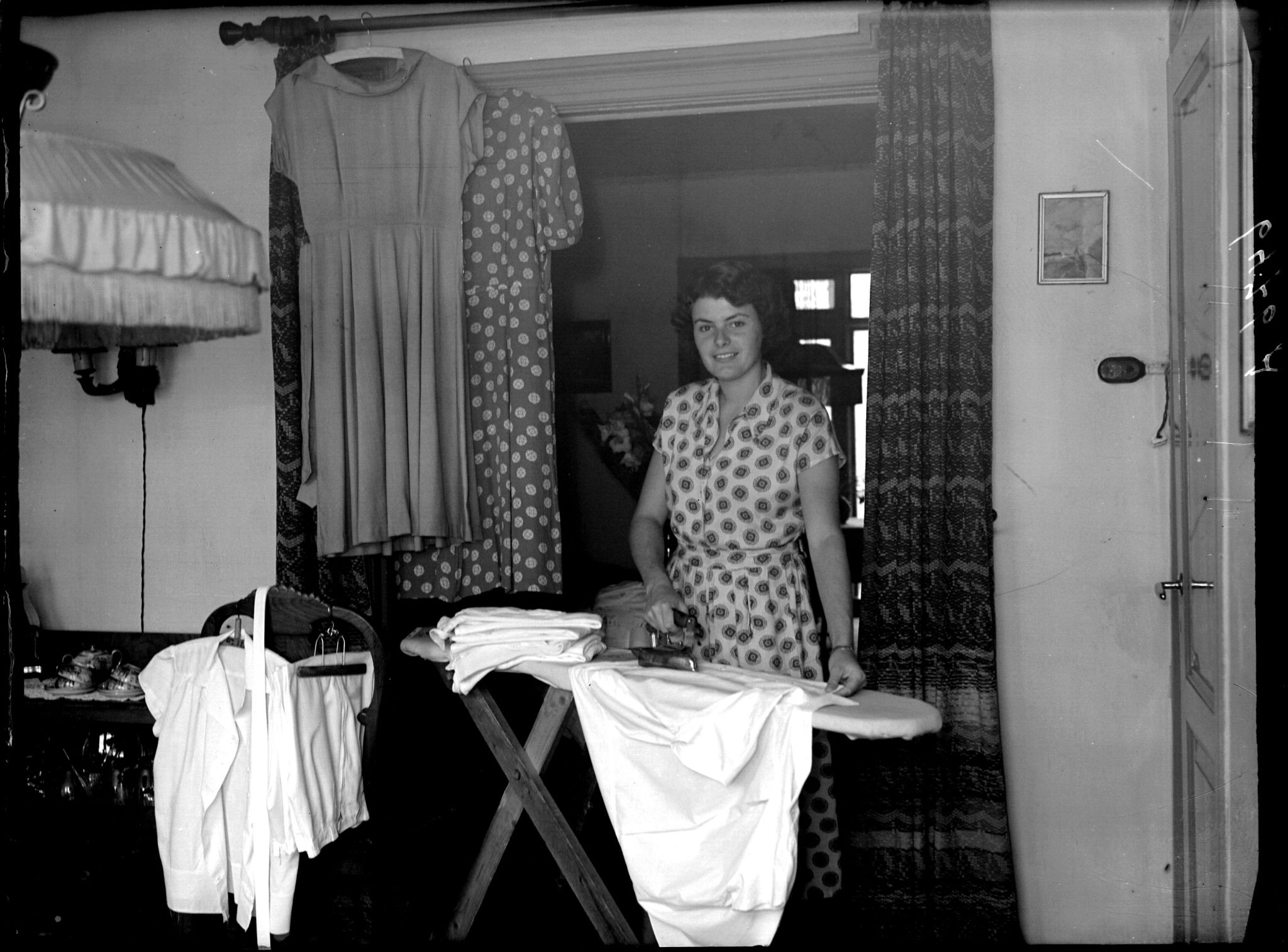 Tennisster Nel Hermsen thuis aan het strijken, 27 augustus 1949 Foto Ben van Meerendonk / AHF, collectie IISG, Amsterdam